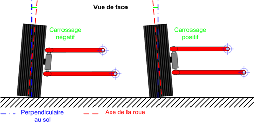 Dessin technique de géométrie de suspension : carrossage, creer pour Wikipedia. Mai 2005 Guillaume Chane Sha Lin